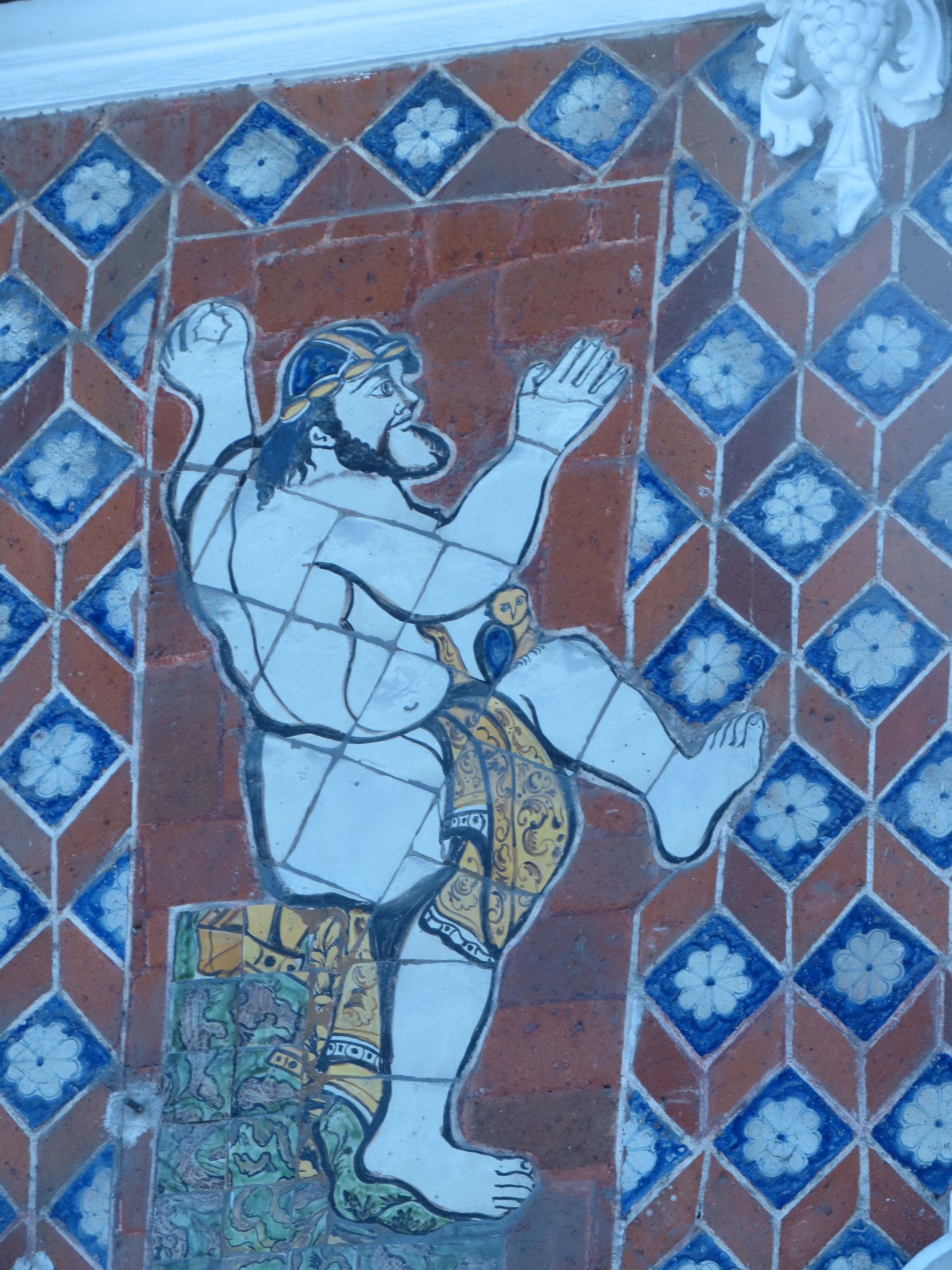 Detalles de la fachada de la Casa de los Muñecos, Puebla